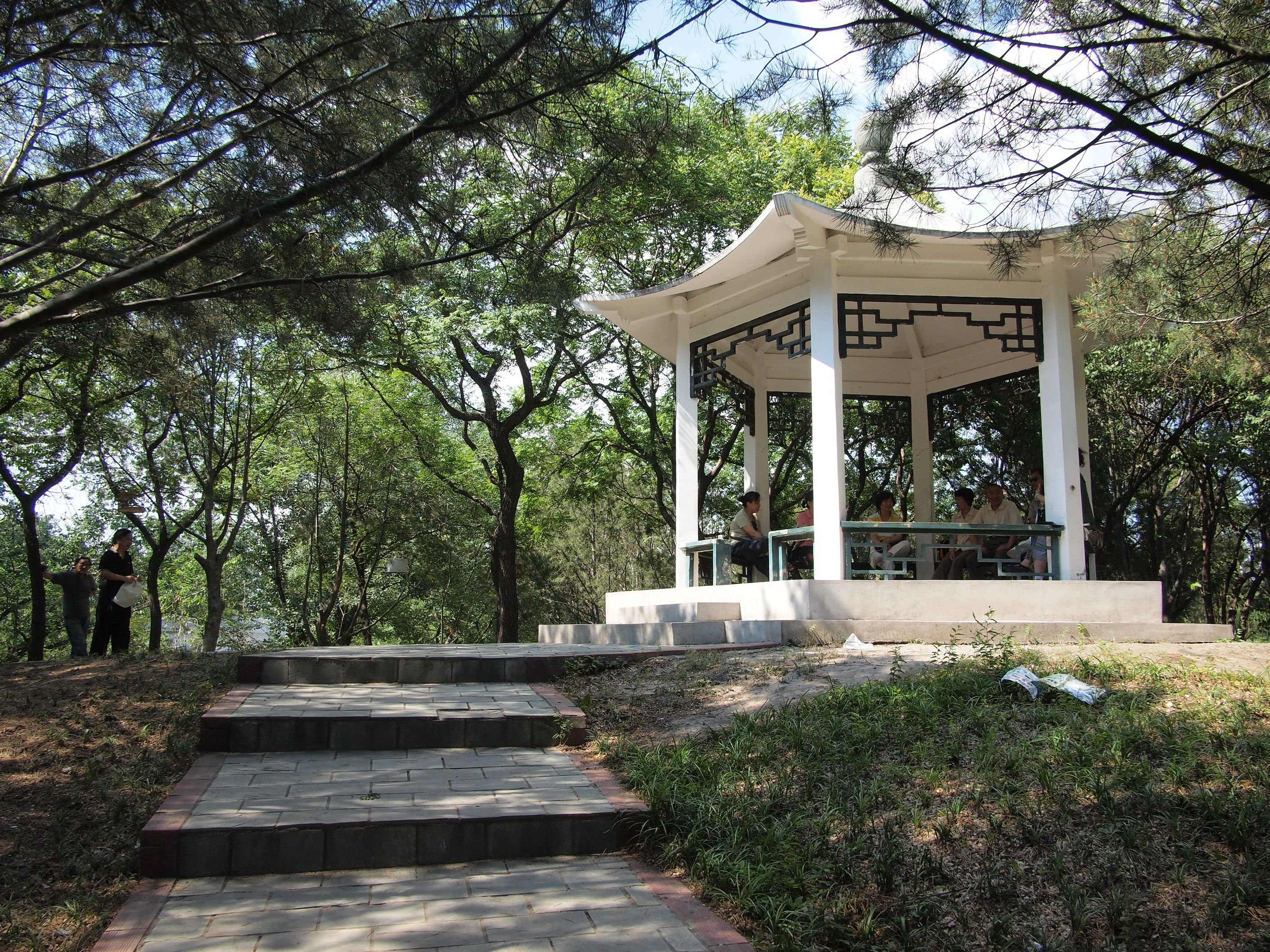 青年湖公园- -Qingnianhu Park - 2011.06